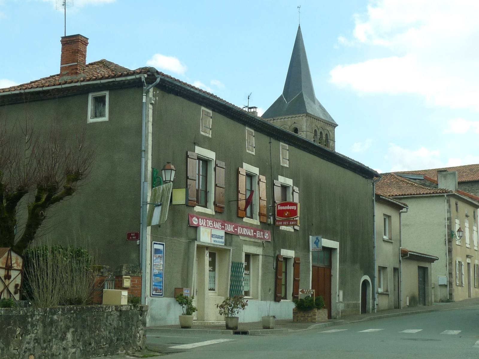 bar tabac de La Péruse, Charente, France